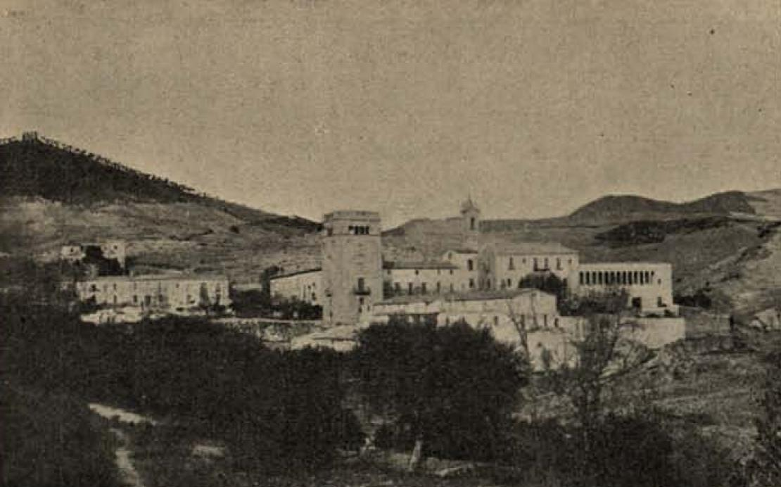 Monestir de Sant Jeroni de la Murtra (Badalona)